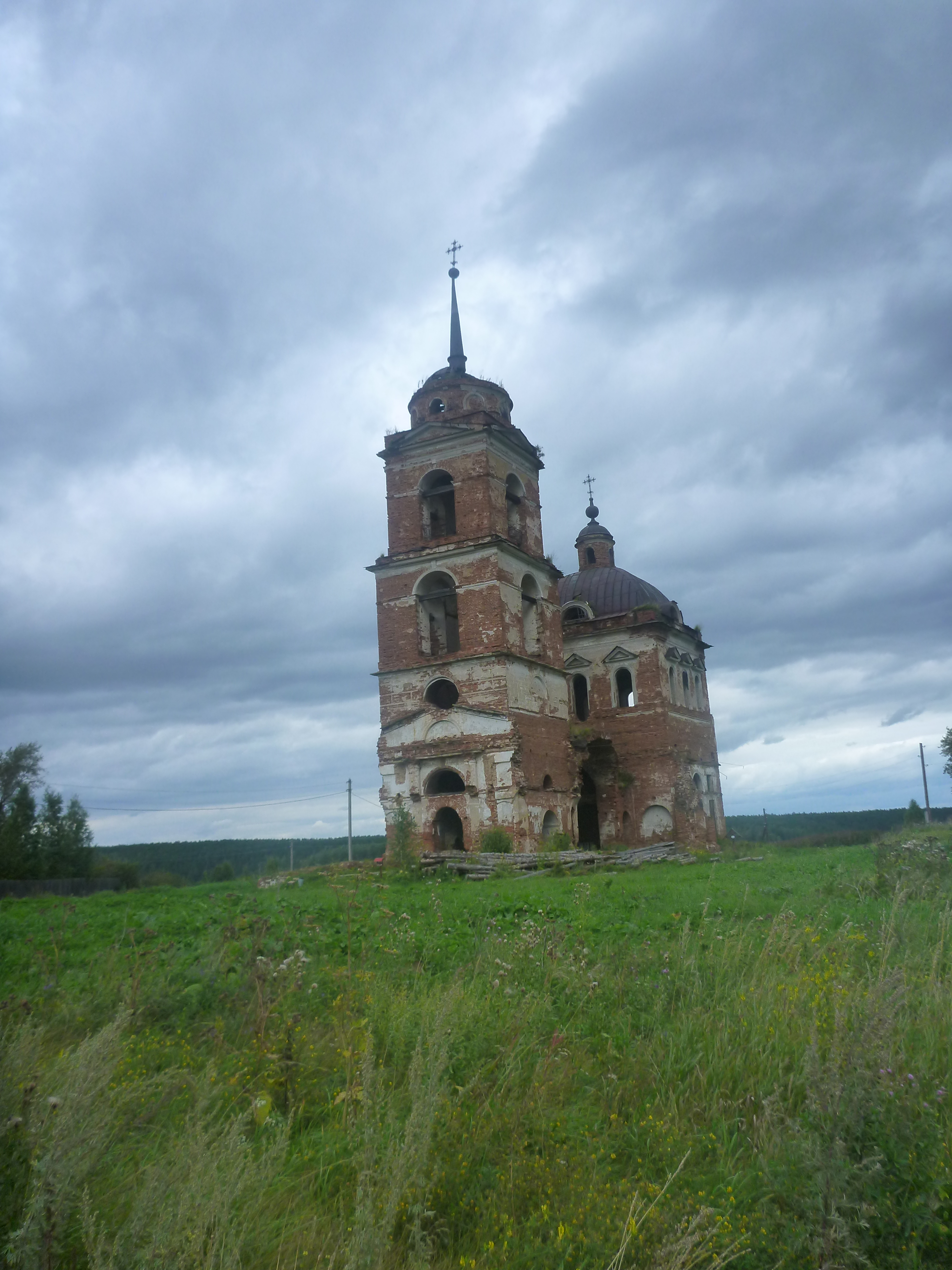 Церковь Ильи Пророка: село Смолинское, Каменский район, Свердловская область